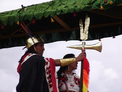 heredero de la clase nobleza hoy vive en Cusco